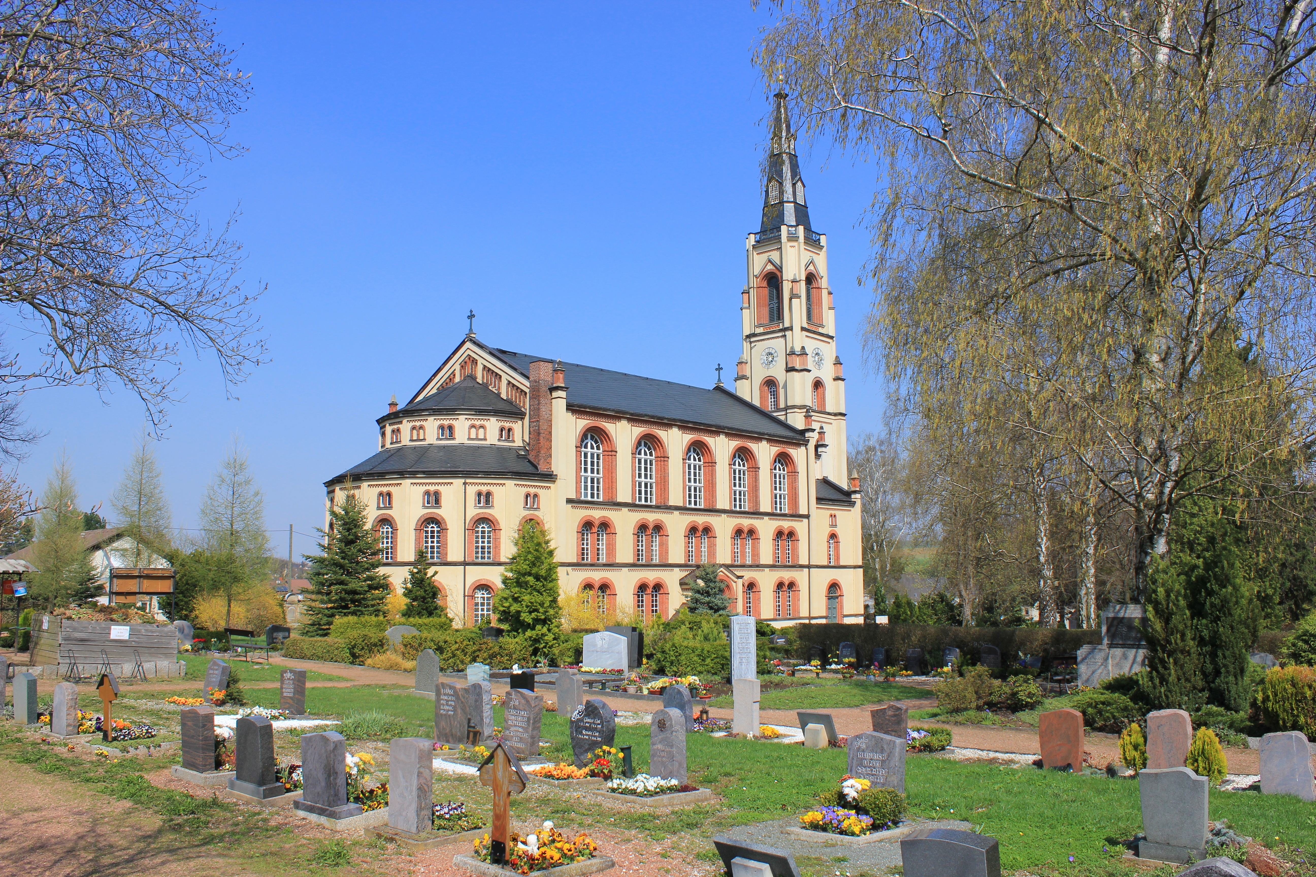 Die Marienkirche wurde 1862 bis 1865 in der Mitte des Ortes erbaut. Sie ist mit einer wertvollen Orgel der Firma Jehmlich ausgestattet. Baumängel machten in der Gegenwart eine umfangreiche Sanierung des Kirchturms nötig, die 1997 begonnen und 2001 abgeschlossen wurde. Während der Sanierung wurde der Helm abgehoben und auf den neu errichteten Turmschaft wieder aufgesetzt. Die Bauleistungen wurden zum größten Teil durch Handwerksbetriebe des Ortes erbracht.